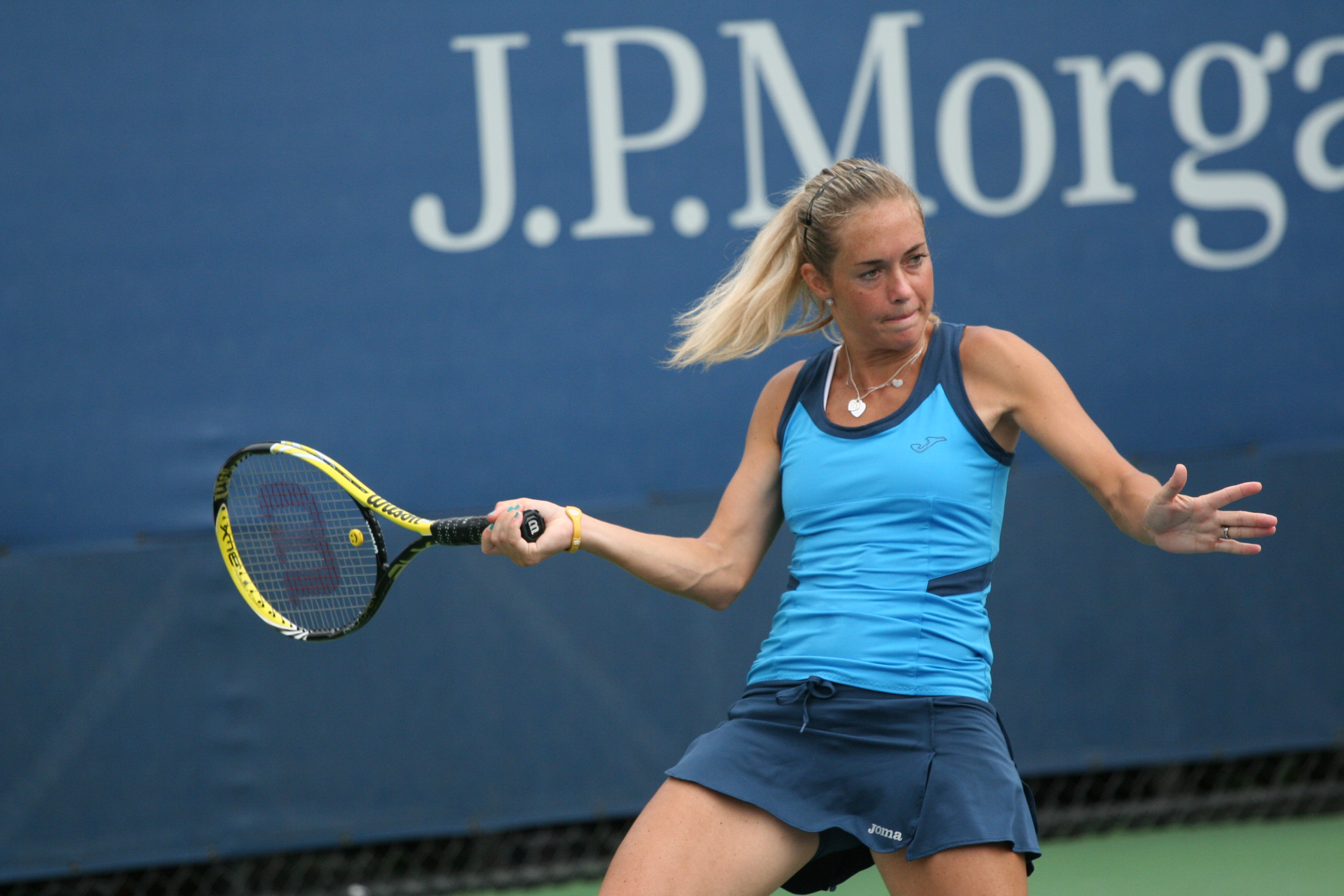 Klára Zakopalová at the 2010 US Open